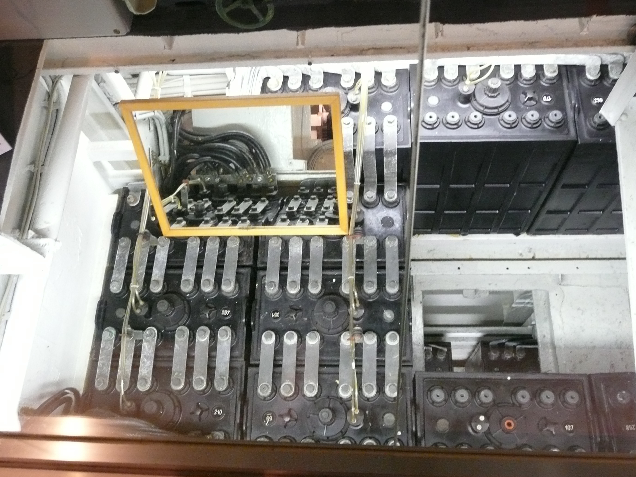 Blick in einen teilweise bestückten Akkumulatorraum des Typ XXI U-Bootes Wilhelm Bauer.